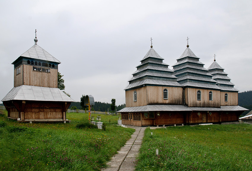 Церква Різдва Пресвятої Богородиці в Розлучі